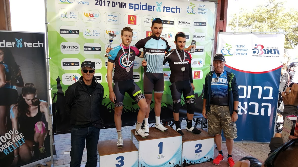 פודיום גברים מרוץ פתיחת העונה באורים ינואר 2017